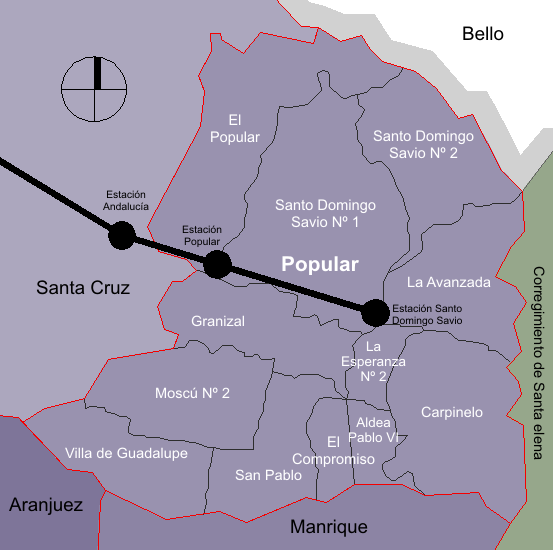 mapa de la división barrial de la comuna Popular. Medellín, Colombia.